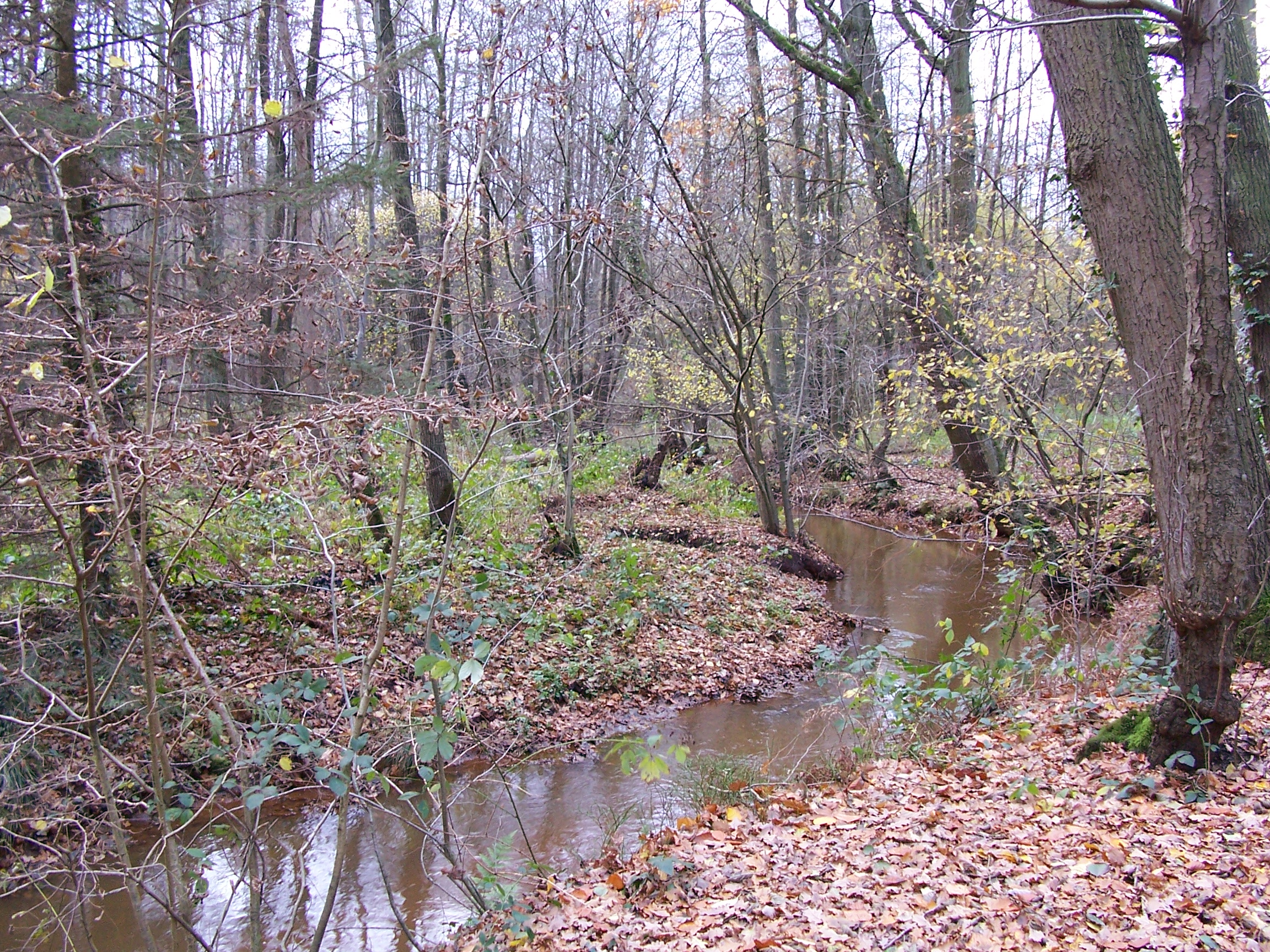 In het Itterdal.